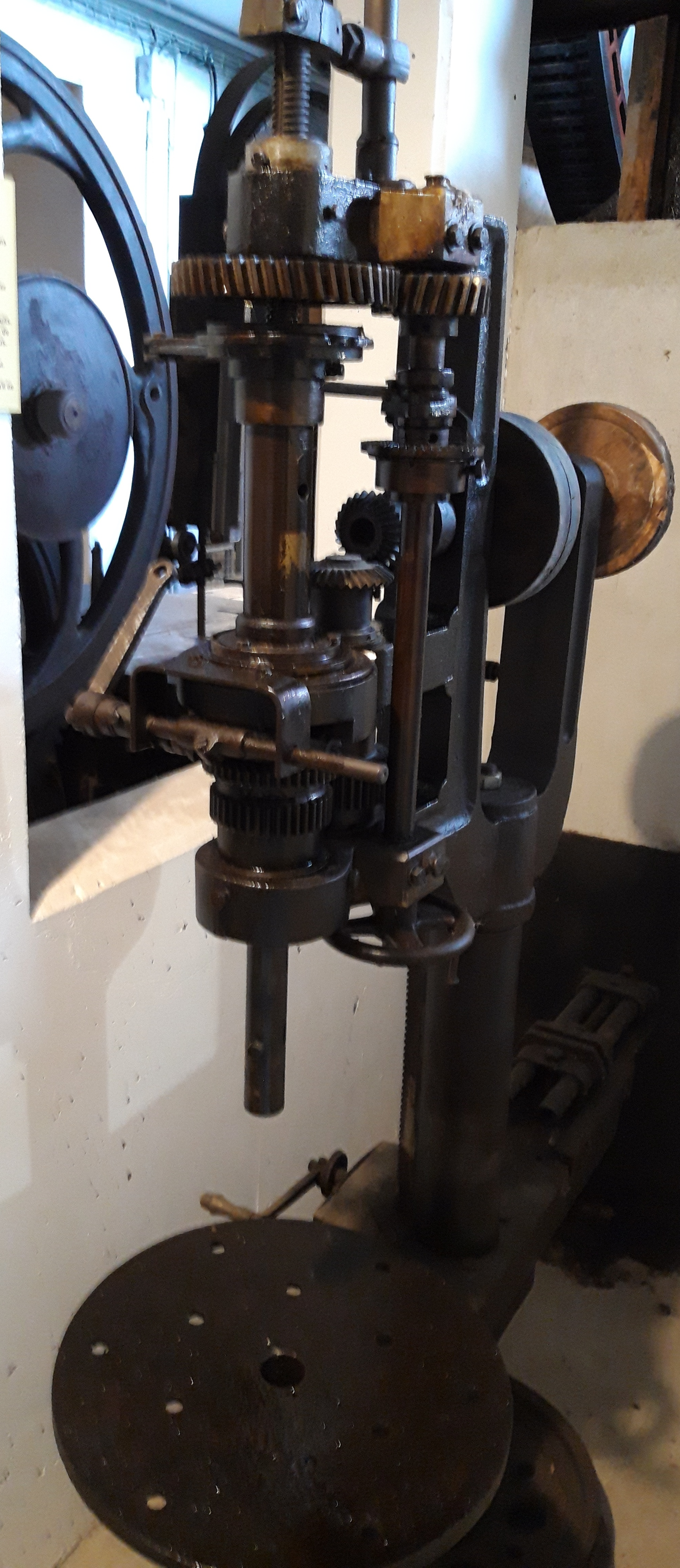 Machine-outil fabriquée à partir de pièces récupérées sur un char d'assaut, 1945, Labaroche (Haut-Rhin)